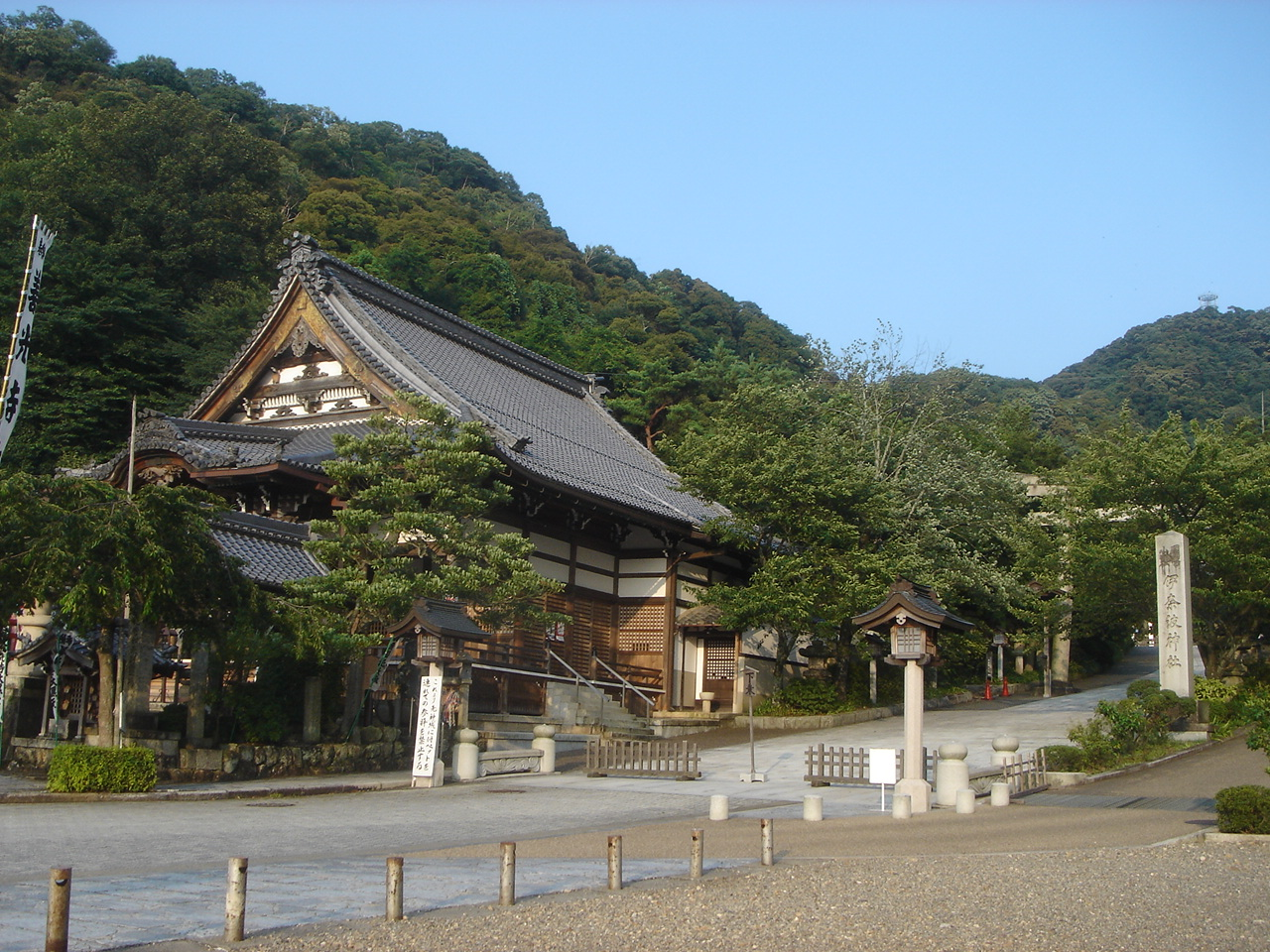 Zenkoji(Temple) in Gifu(善光寺 (岐阜市)),Gifu,Gifu,Japan(岐阜県岐阜市)で撮影。右側奥がw:ja:伊奈波神社。